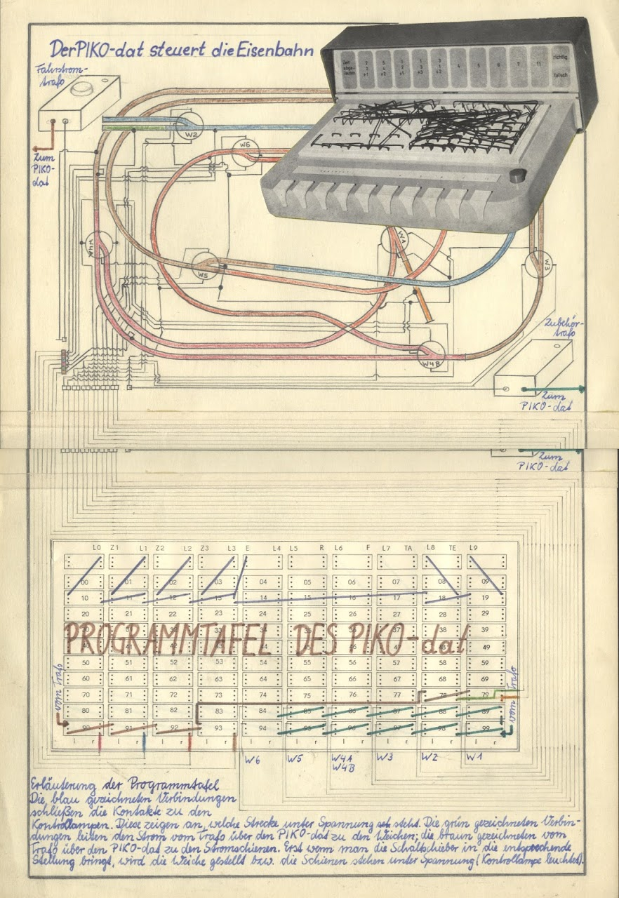 In der Schule stellte ich 1977 auf der Messe der Meister von Morgen das Exponat "Der PIKO-dat steuert die Eisenbahn" aus. Deshalb gibt es noch heute ein Plakat dazu.